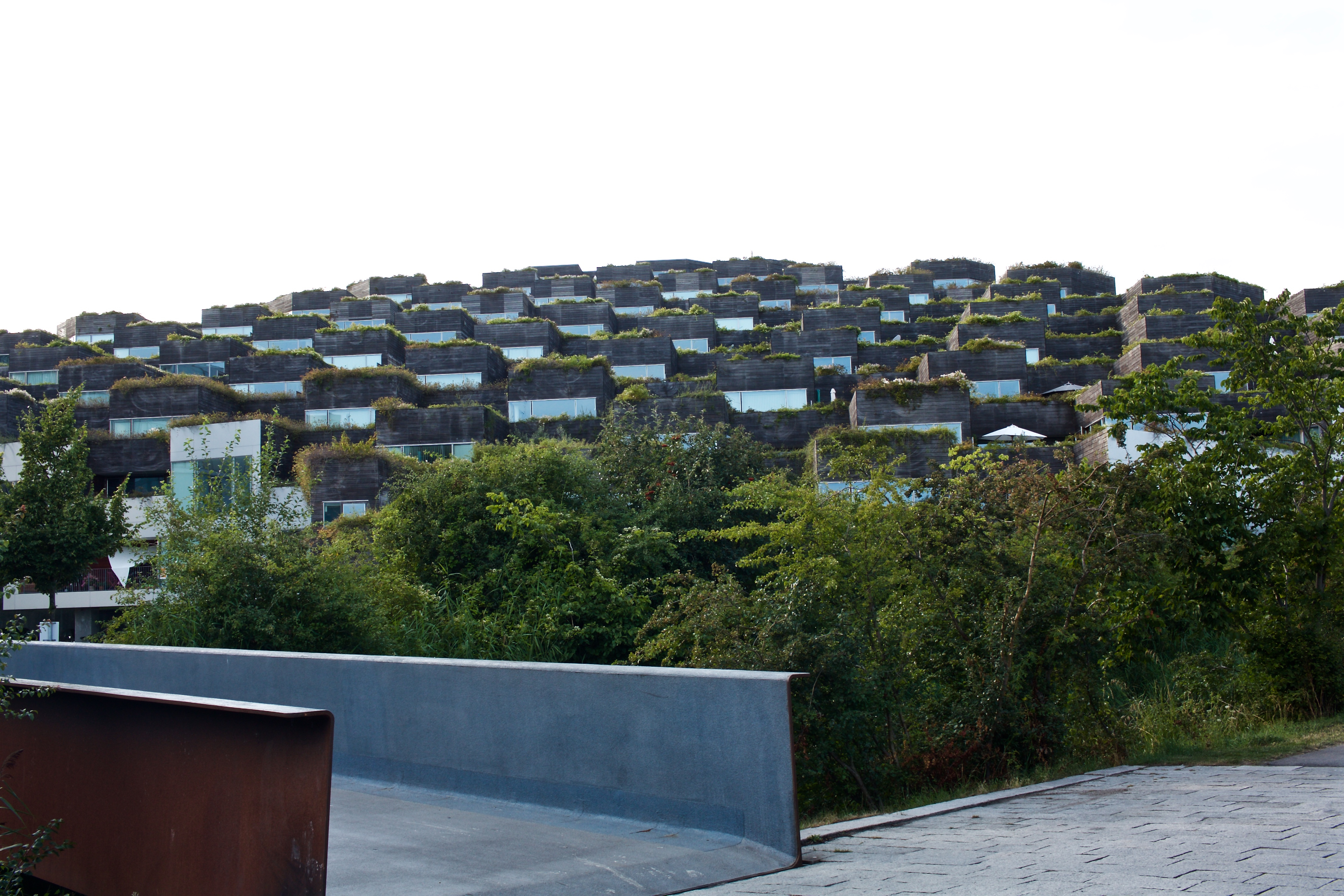 VM Mountain Dwellings, Ørestad, Copenhagen, Denmark